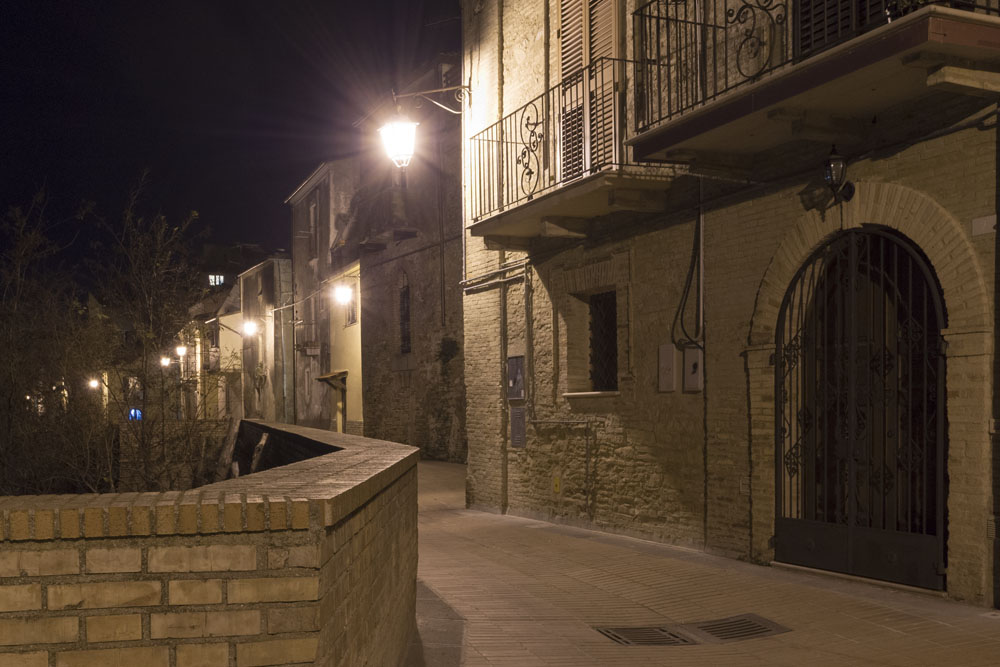 Scorcio notturno da Via delle Ripe